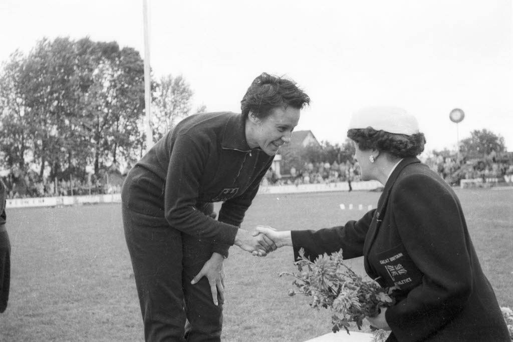 im Holsteinstadion. Im Bild gratuliert eine britische Sportfunktionärin der Speerwerferin Almuth Brömmel (links) zum neuen deutschen Rekord von 53,77 Meter.